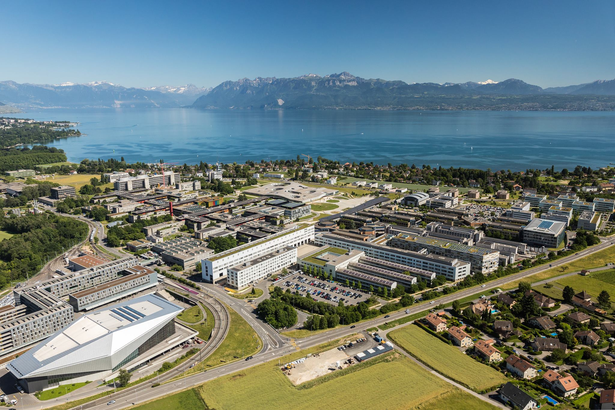 Vue aérienne (2017) de l'École polytechnique fédérale de Lausanne (EPFL); l'EPFL forme avec l'Université de Lausanne (hors de la photo) un vaste campus à proximité du lac Léman.